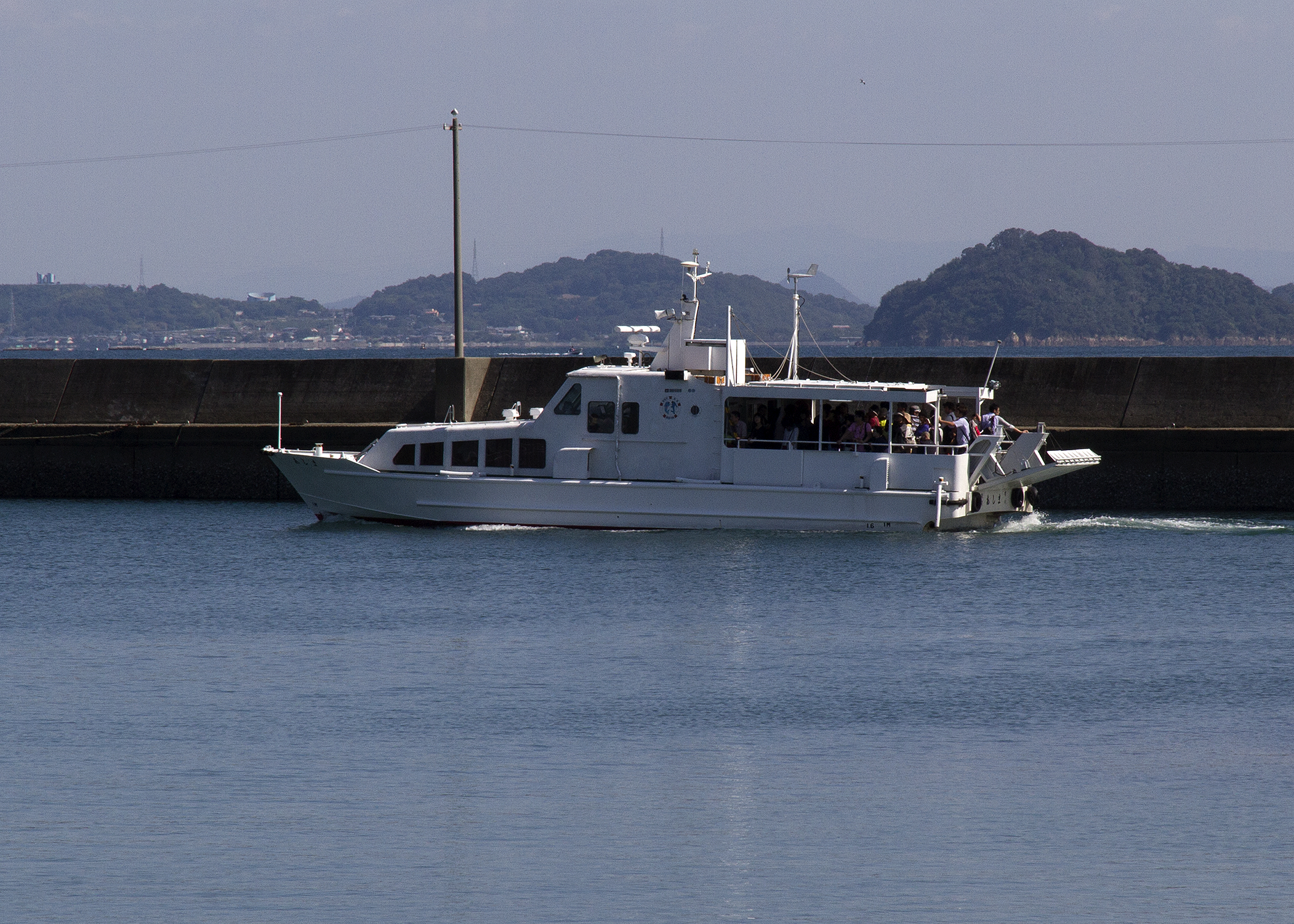 粟島汽船（香川県） あしま 粟島にて